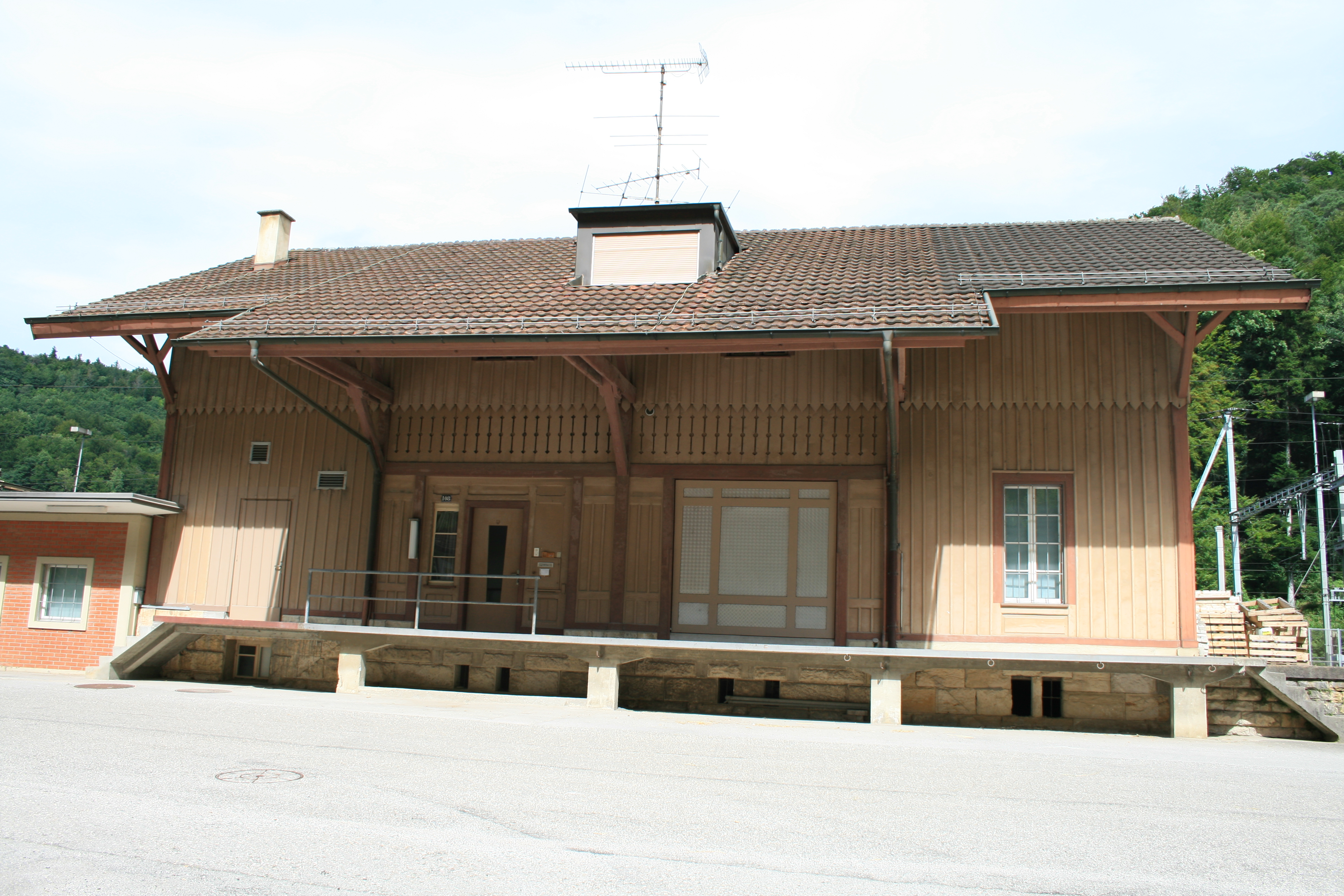 Bahnhof Effingen